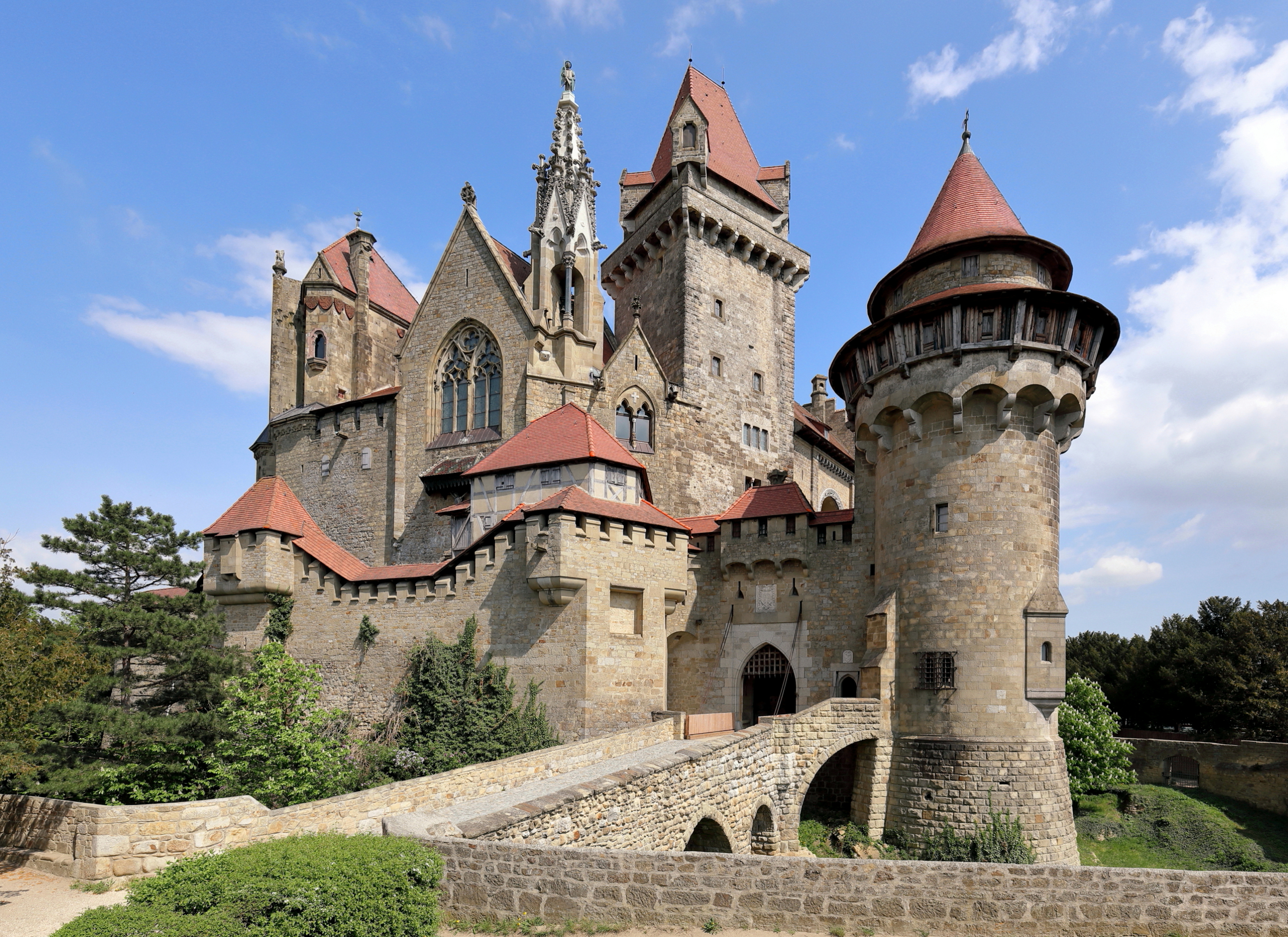 Westansicht der Burg Kreuzenstein in der niederösterreichischen Marktgemeinde Leobendorf. Die ursprüngliche Burg wurde im Zuge des 30-jährigen Krieges zerstört und anschließend als Baumaterial großteils abgetragen. Unter Graf Johann Nepomuk Wilczek erfolgte von 1874 bis 1906 ein Wiederaufbau der Burg als Museum für seine umfangreichen Kunstsammlungen. Die so entstandene Schauburg ist heute, ergänzt durch zahlreiche wiederverwendete mittelalterliche Bauteile und nach teilweiser Beseitigung der Brandschäden von 1915 und der Kriegsschäden von 1945, ein beliebtes Tourismusziel nördlich von Wien.